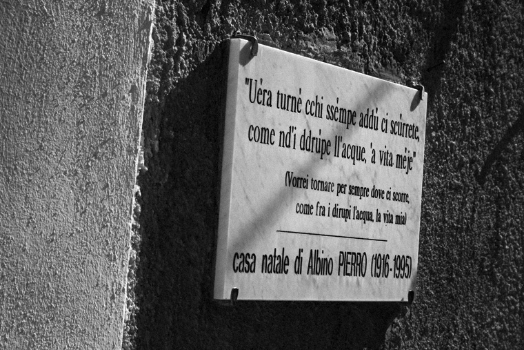 targa marmorea